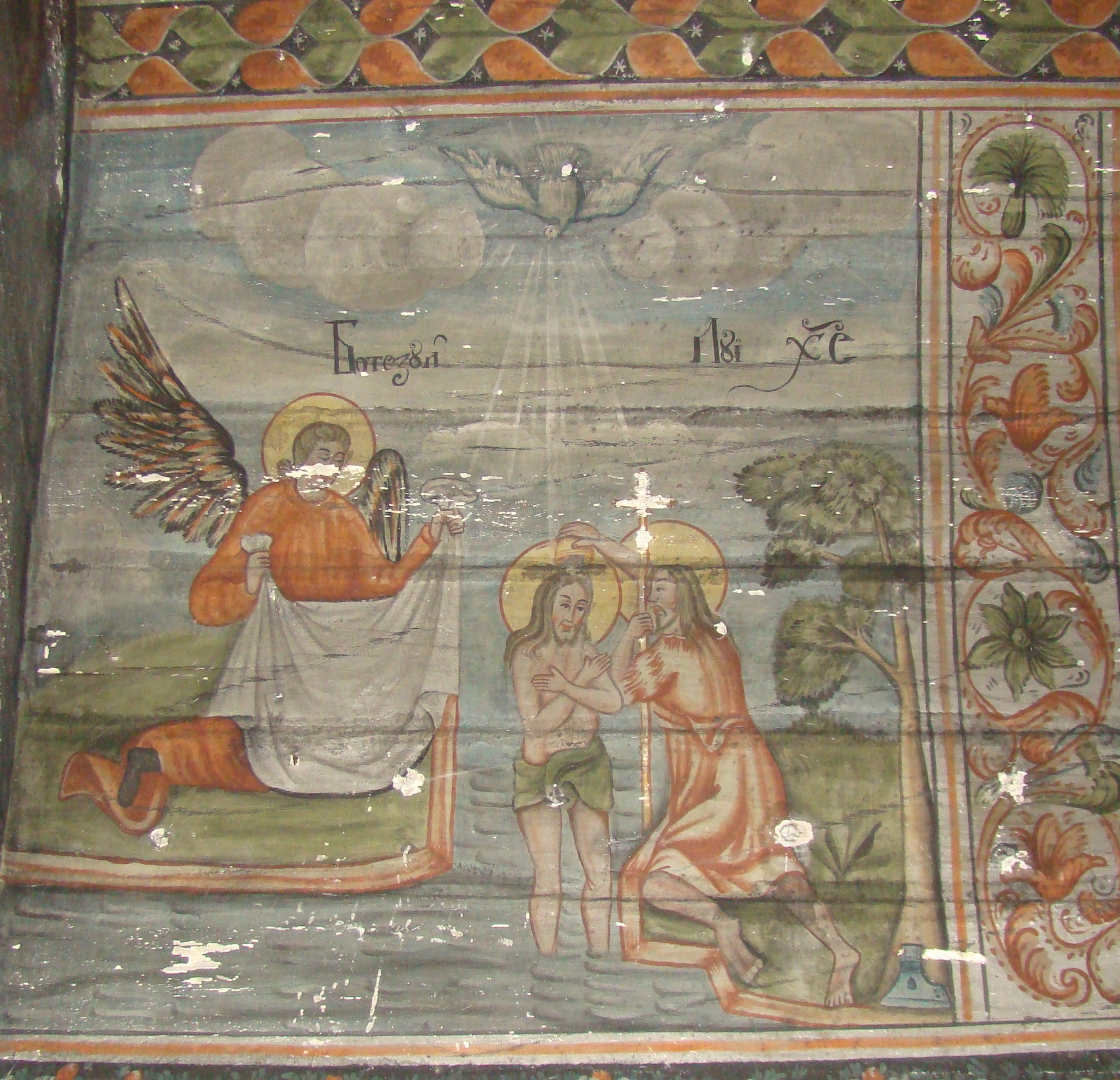 Biserica de lemn din Osoi